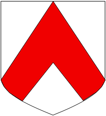 D'argent au chevron de gueules